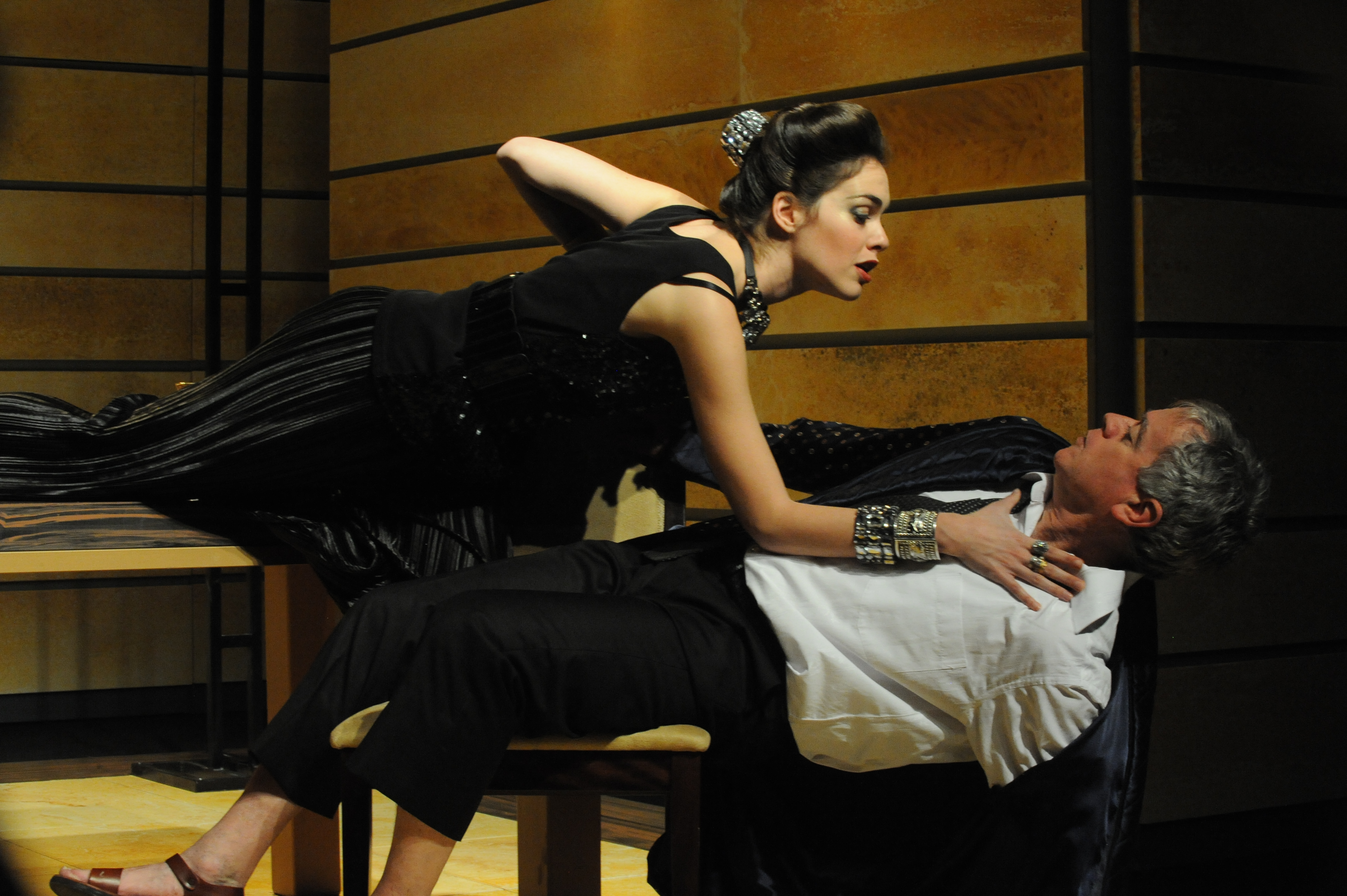 ההצגה "אוכלים" בבימויו של מיקי גורביץ', תיאטרון החאן, 2011